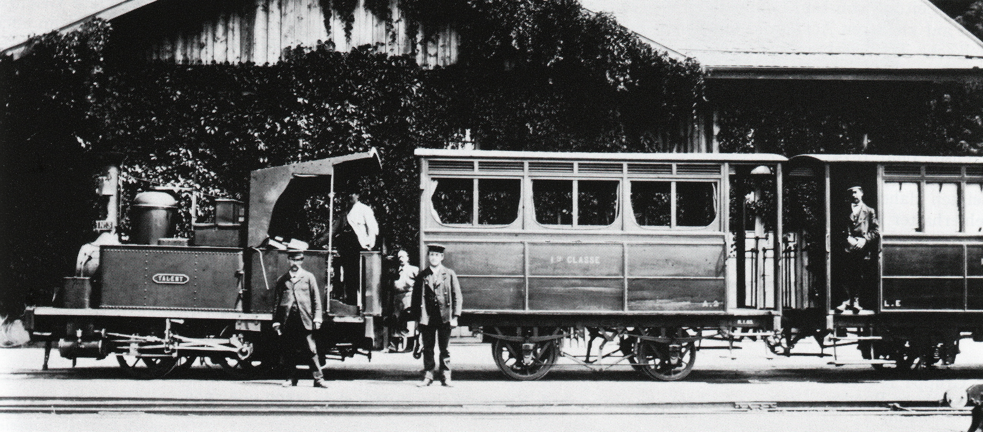 Perſonenzug der Lauſanne–Echallens–Bercher-Bahn, gezogen von der Dampflocomotive G 2/2 Nr. 3 Talent, gebaut 1873 von Schneidern & Cie. zů Le Creuſot im Burgund (Fabr.-Nr. 1562), 1909 außer Dienſt geſtellt und anſchließend abgebrochen.